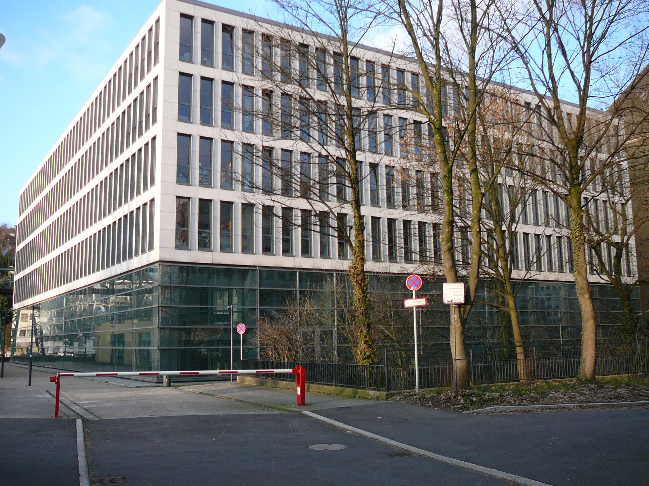 Friedrich-Engels-Allee, Wuppertal